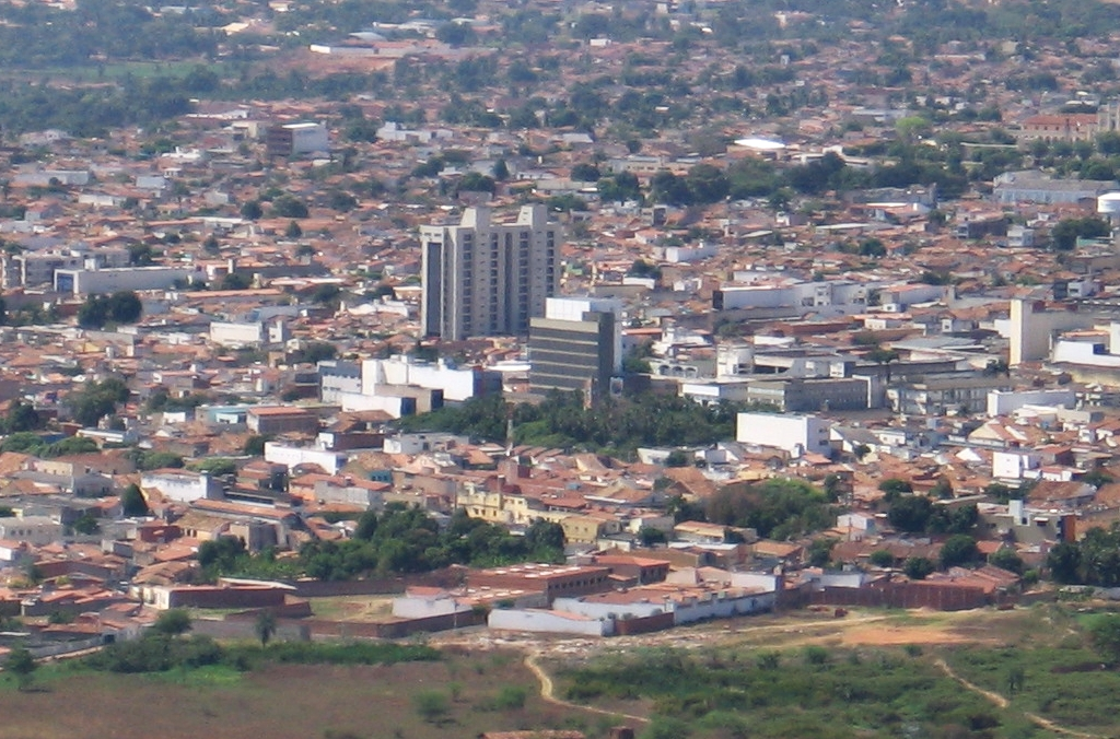 Vista da cidade de Juazeiro do Norte a partir da Estátua de Padre Cícero na Colina do Horto. Ceará, Brasil.